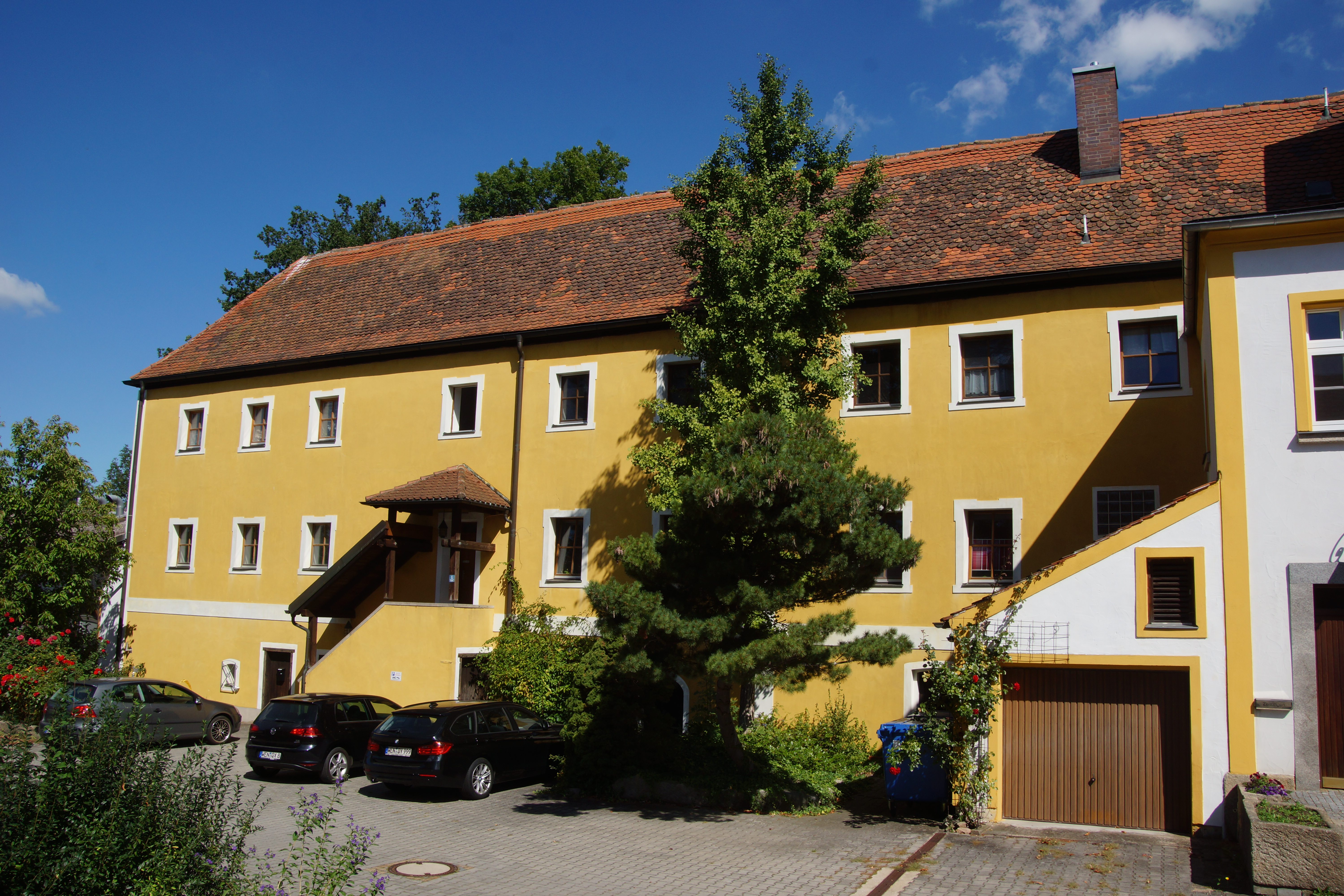 Pirk bei Weiden